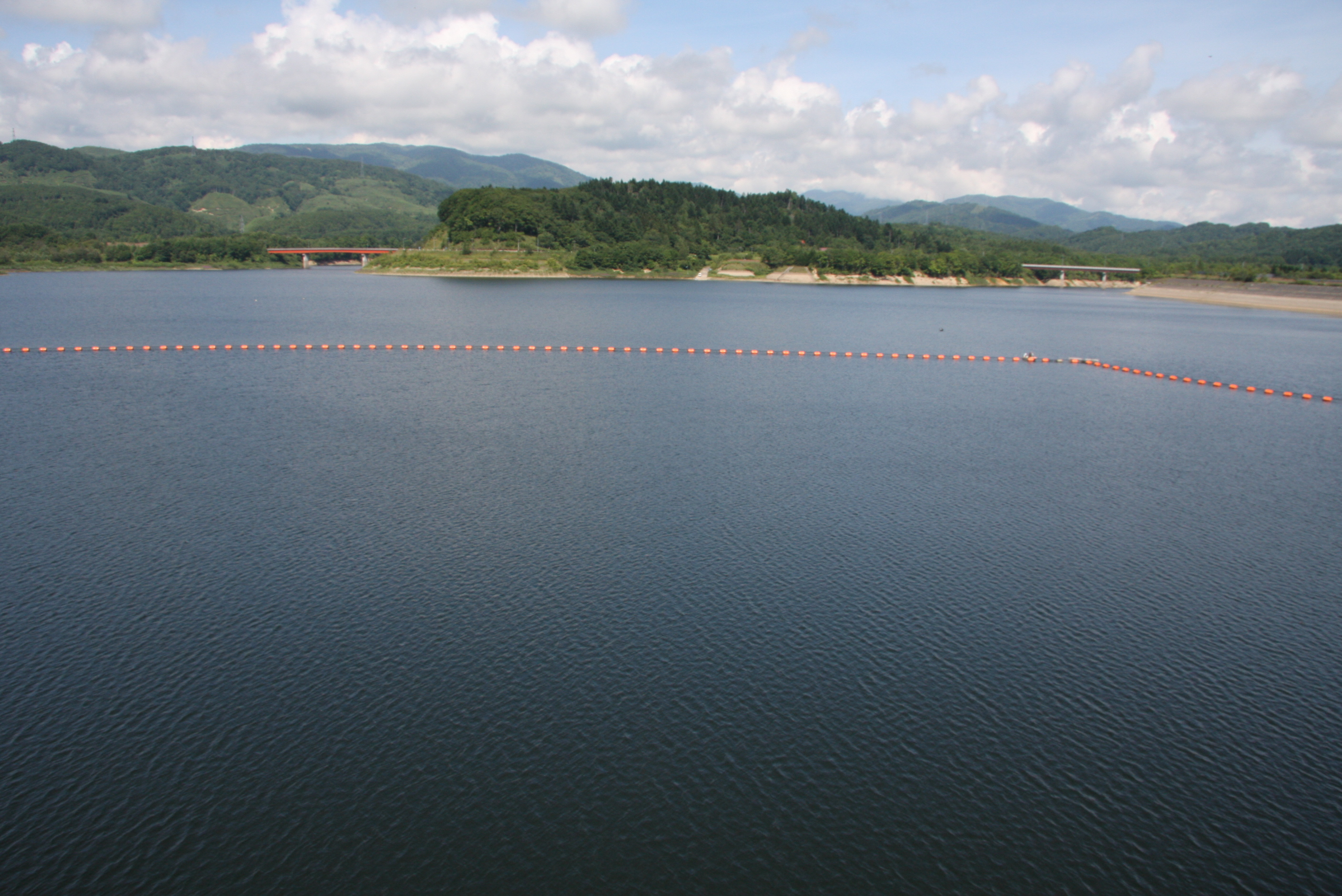 ピリカ湖 美利河ダムより望む